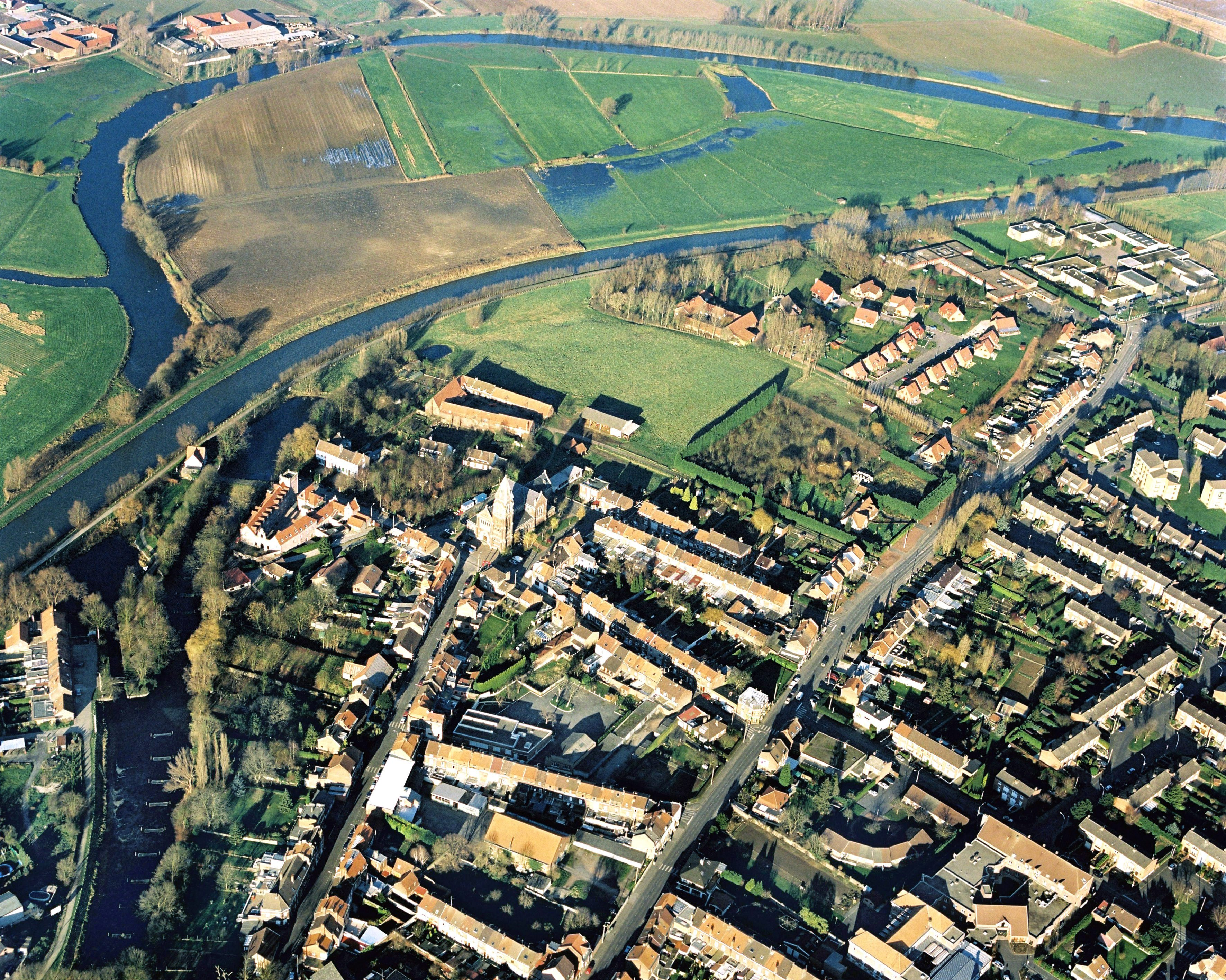 Vue aérienne du bourg d'Houplines, le long de la Lys